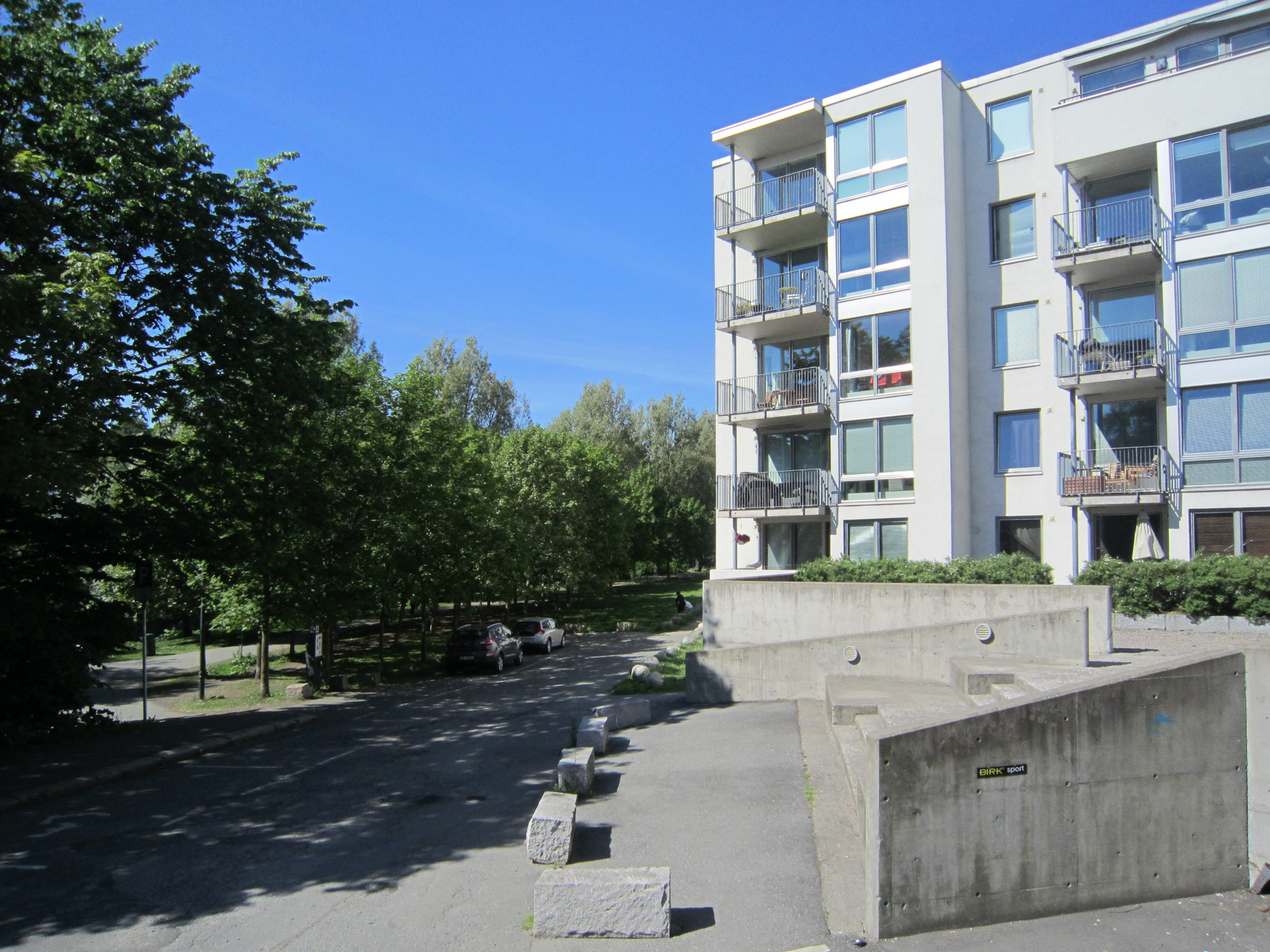 Myra på Sagene/Torshov i Oslo, tilsynelatende uten et gateskilt